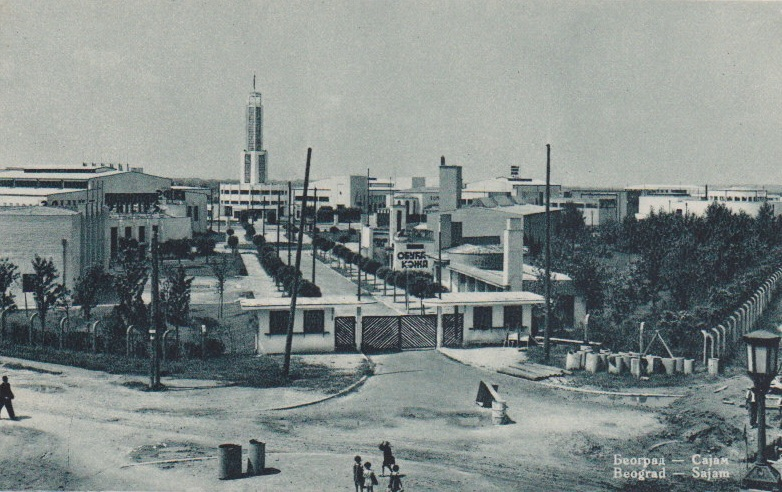 Београдски сајам је изграђен на основу одлуке Београдске општине 1936. године. Друштву за приређивање сајма и изложби је уступљен терен крај новоизграђеног Моста краља Александра. Прва фаза радова је започета у пролеће 1937. године, а завршена је до отварања, септембра 1937. Друга фаза, у којој су изграђени Турски и велики Немачки павиљон, завршена је 1938. Планирана је изградња и шестог југословенског павиљона, али су радови обустављени због избијања Другог светског рата. За време Другог светског рата га је Гестапо користио као концентрациони логор у ком је страдало око 48.000 људи.